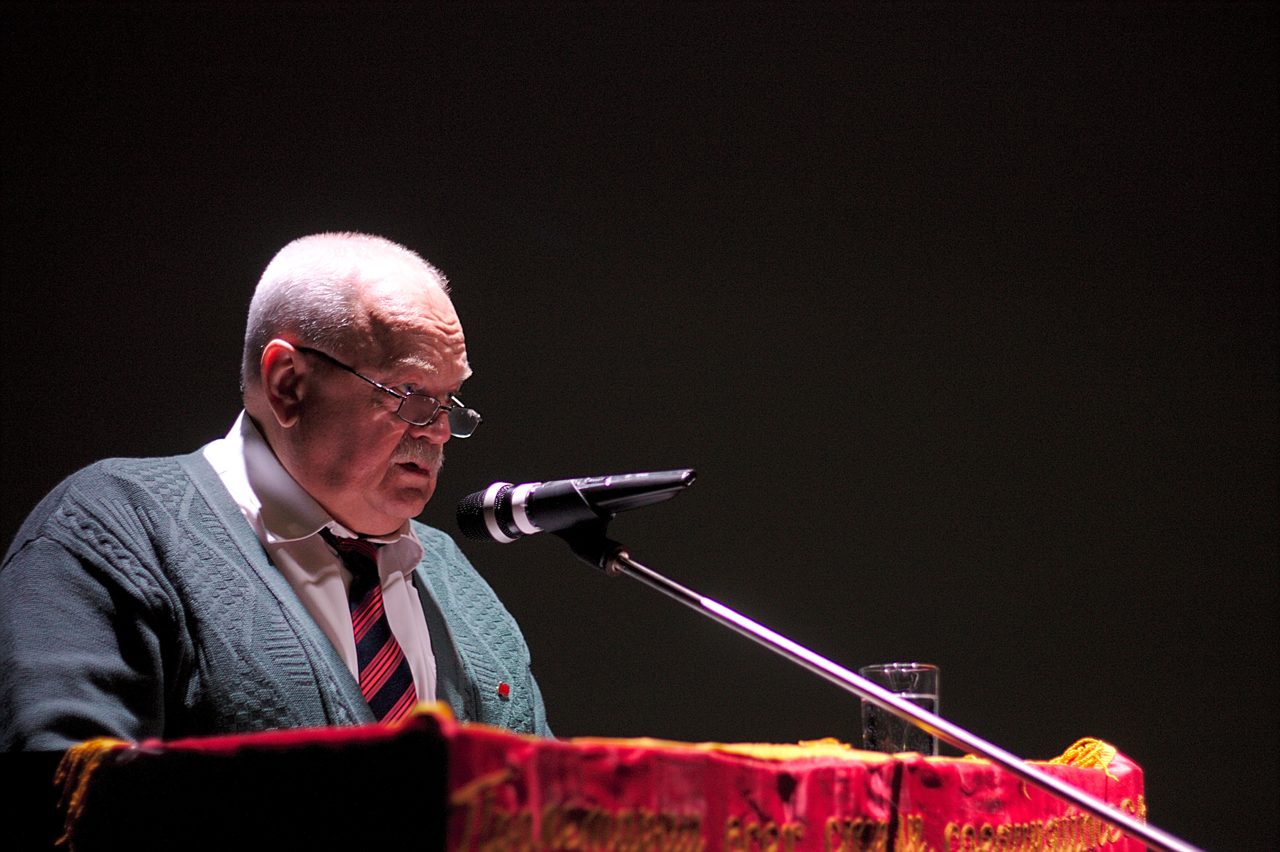 Виктор Тюлькин на XX (X) Съезде РКРП-КПСС